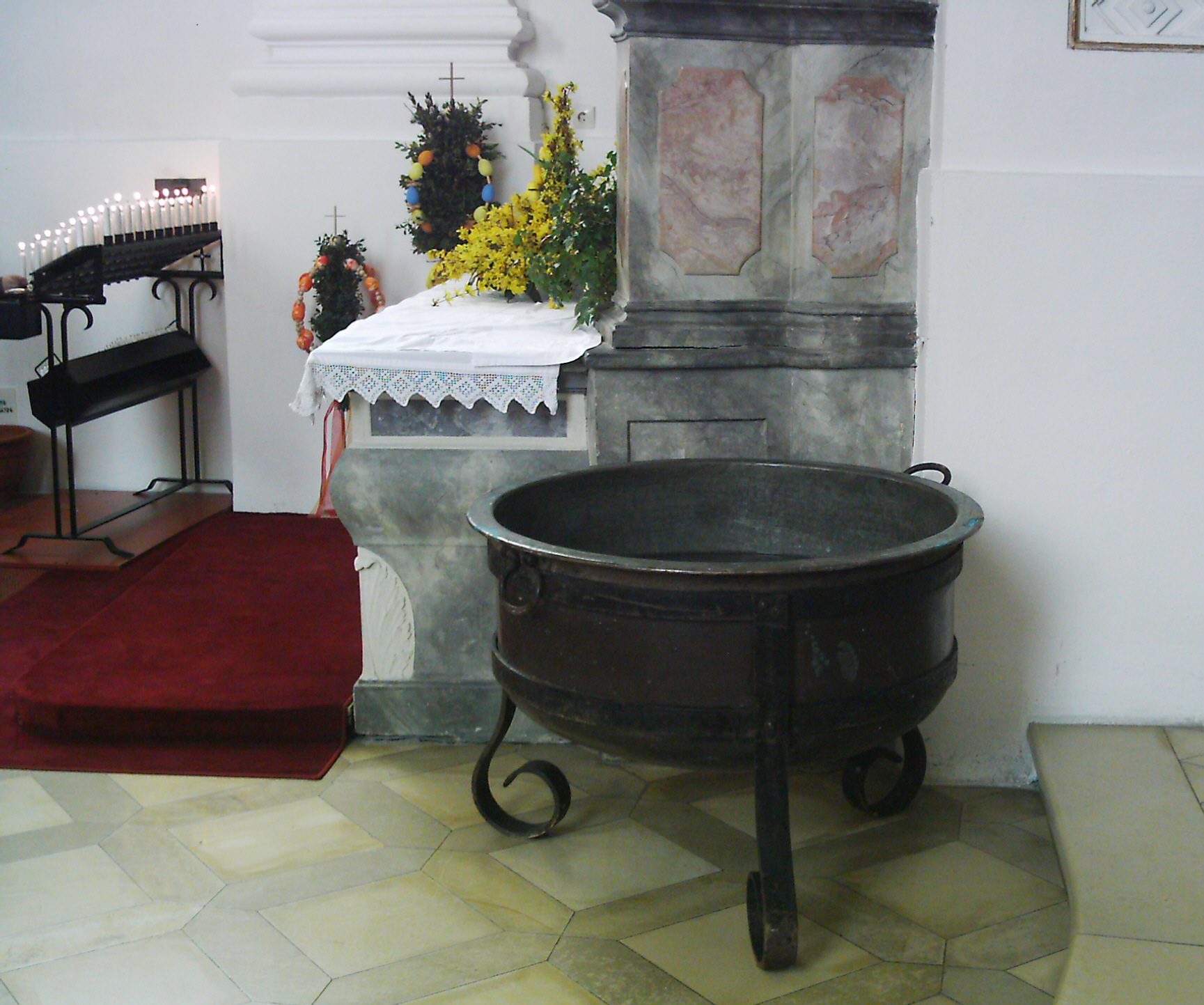 Römisch-katholische Pfarrkirche St. Maria, Schloß Zeil, Leutkirch im Allgäu Osterwasserbecken geweiht in der Osternacht.